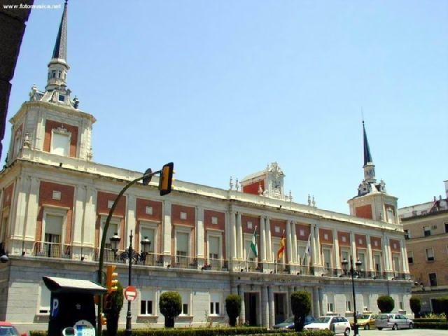 Ayuntamiento de Huelva